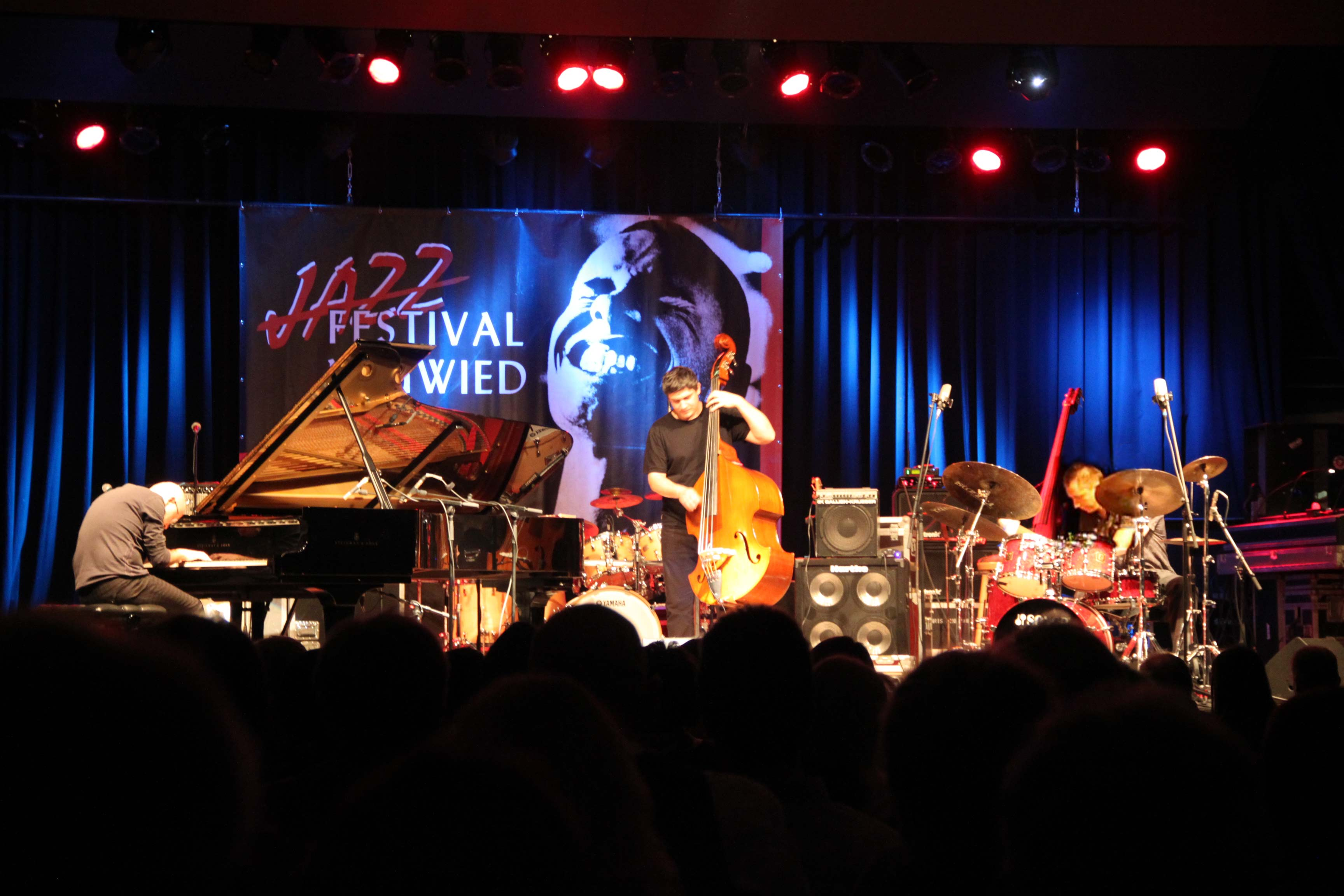 Marcin Wasilewski Trio auf dem Jazz-Festival Neuwied, 2011